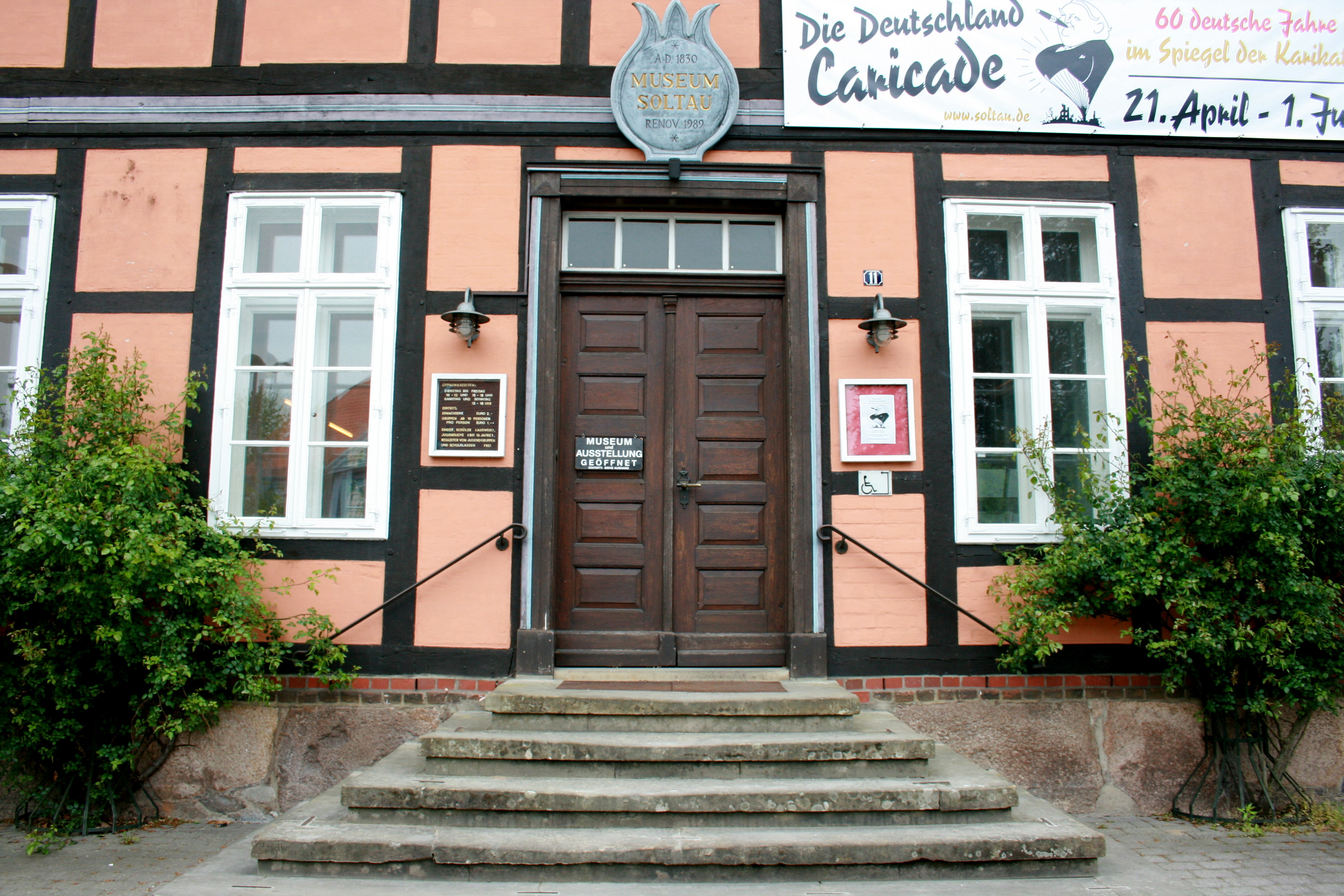 Museum Soltau, Poststraße 11 in Soltau